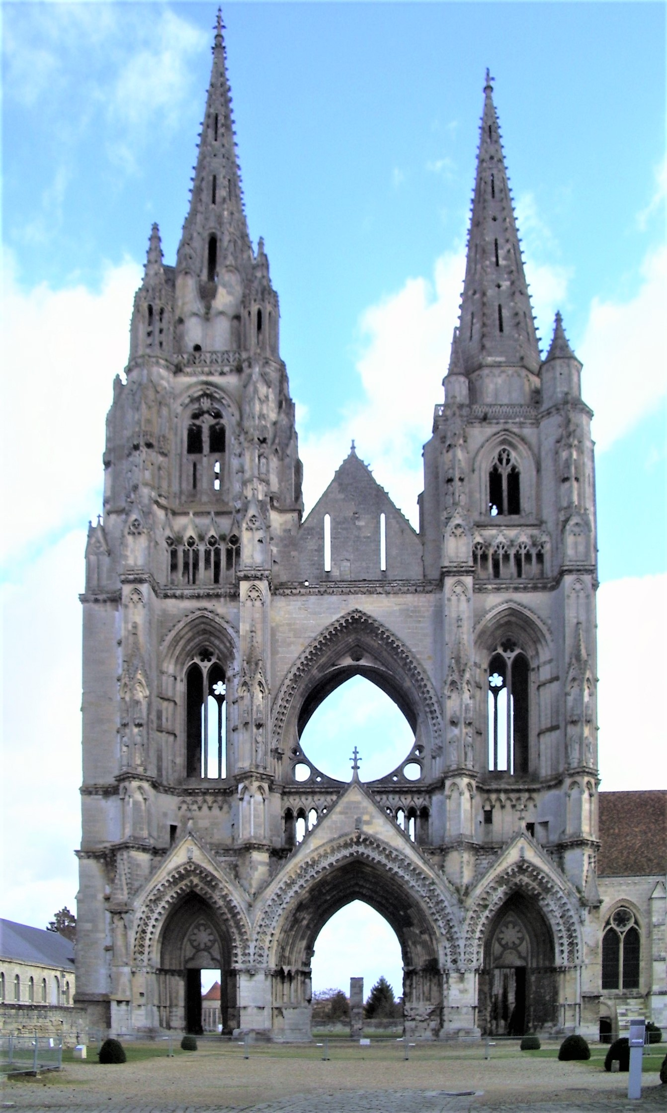 Ruine St. Jean zu Soissons